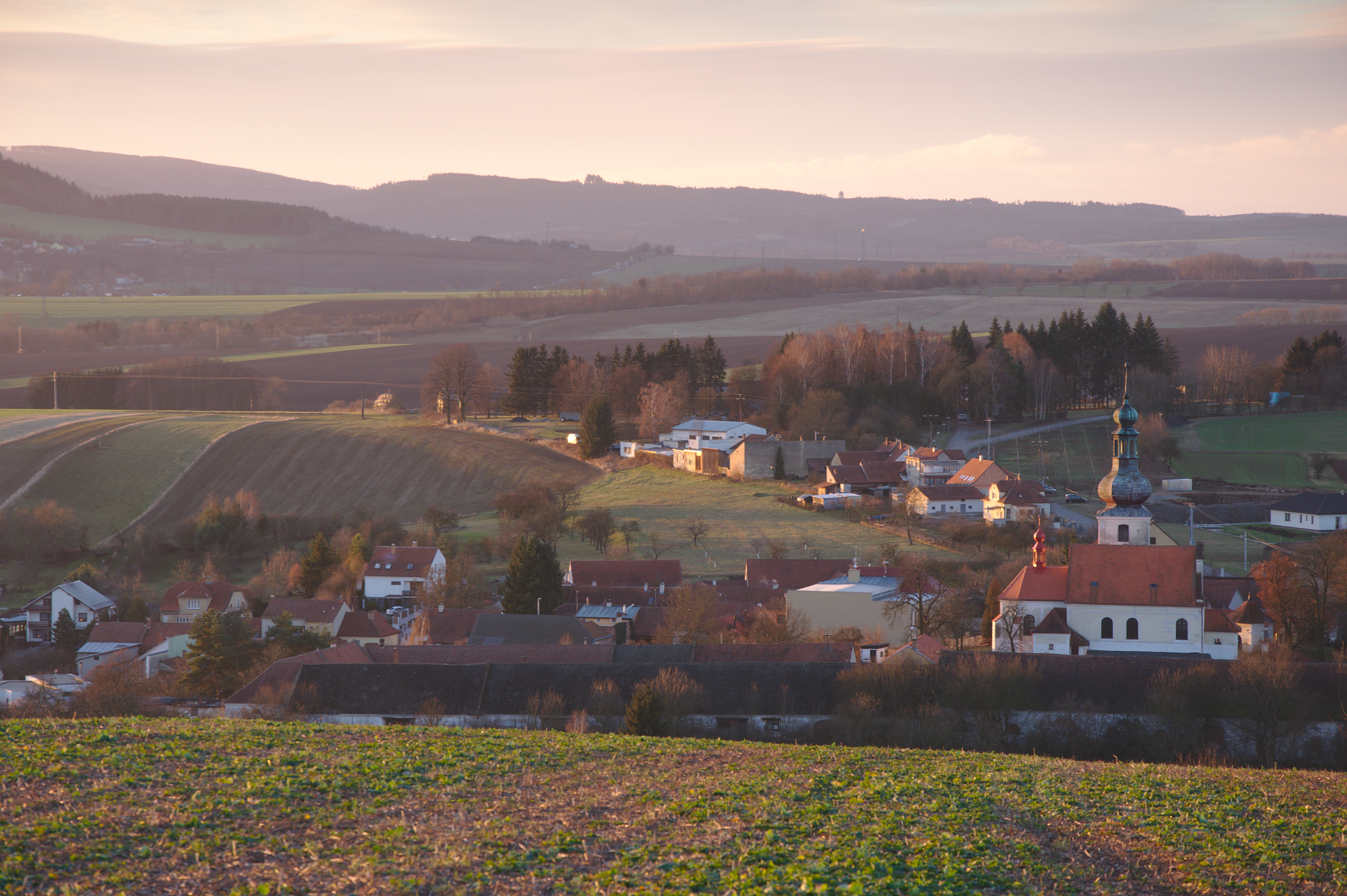 Obec od severu, Sebranice, okres Blansko